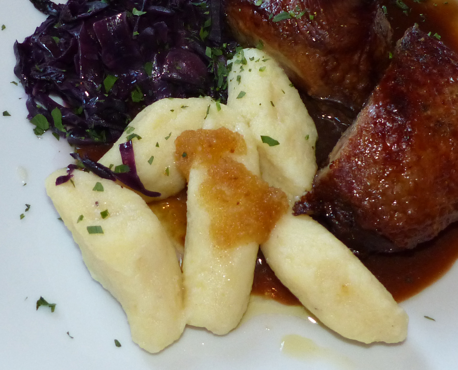 Stubberle (auch Stupperle) - Oberlausitzer Kartoffelklöße, Brauhaus im Faktorenhof, Eibau, Oberlausitz